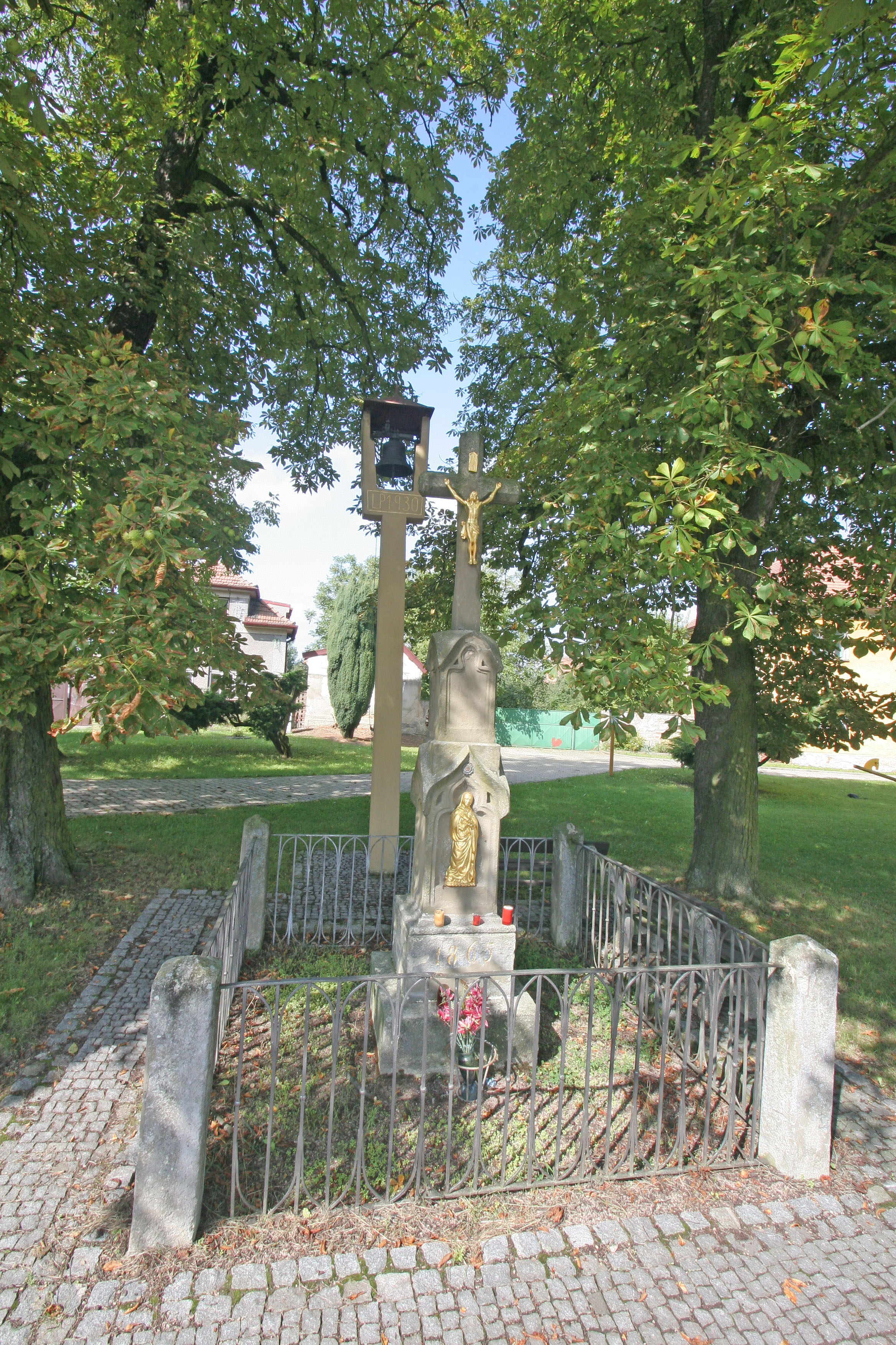 Spytovice kříž